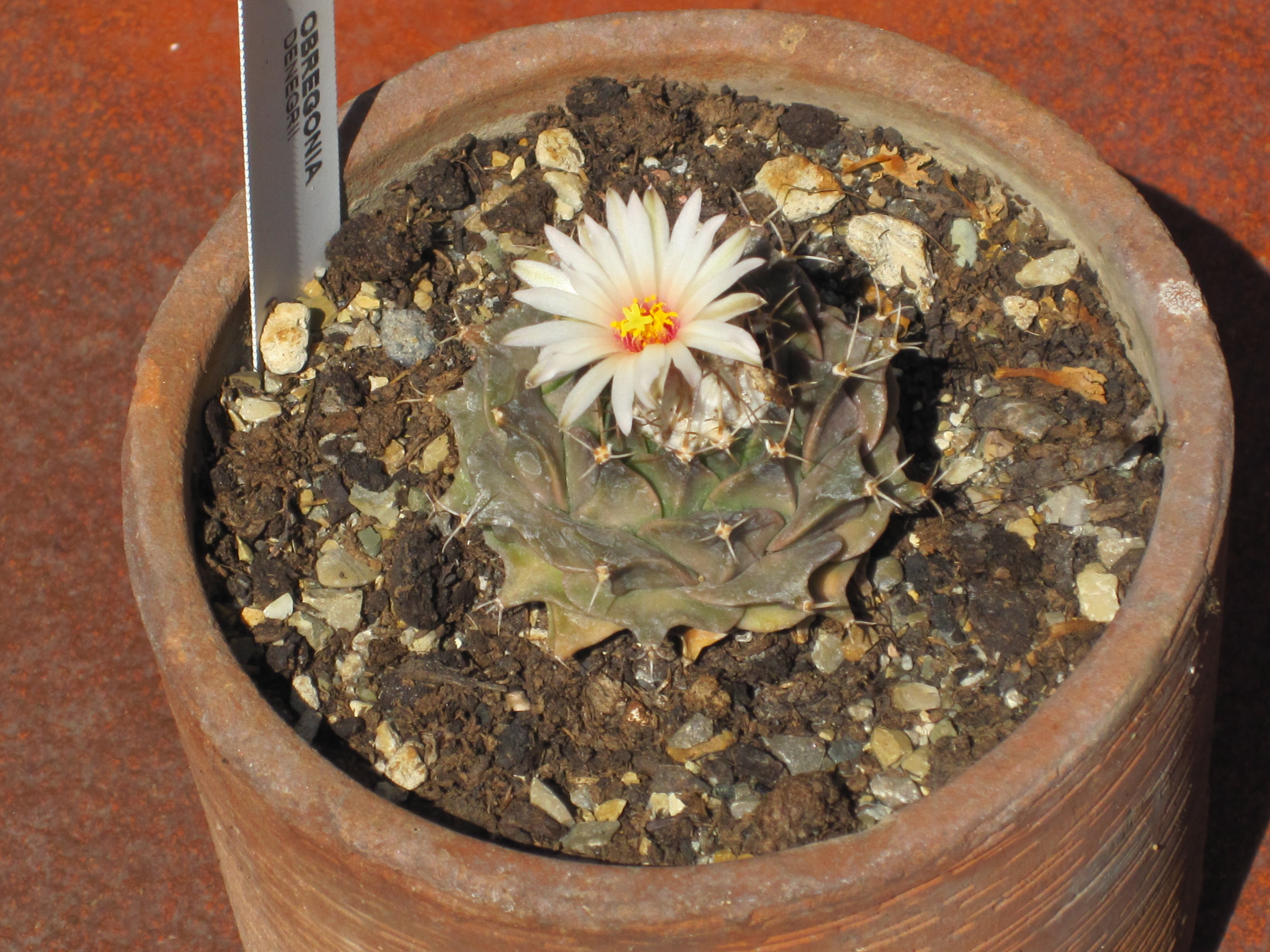 Fioritura della obregonia denegrii